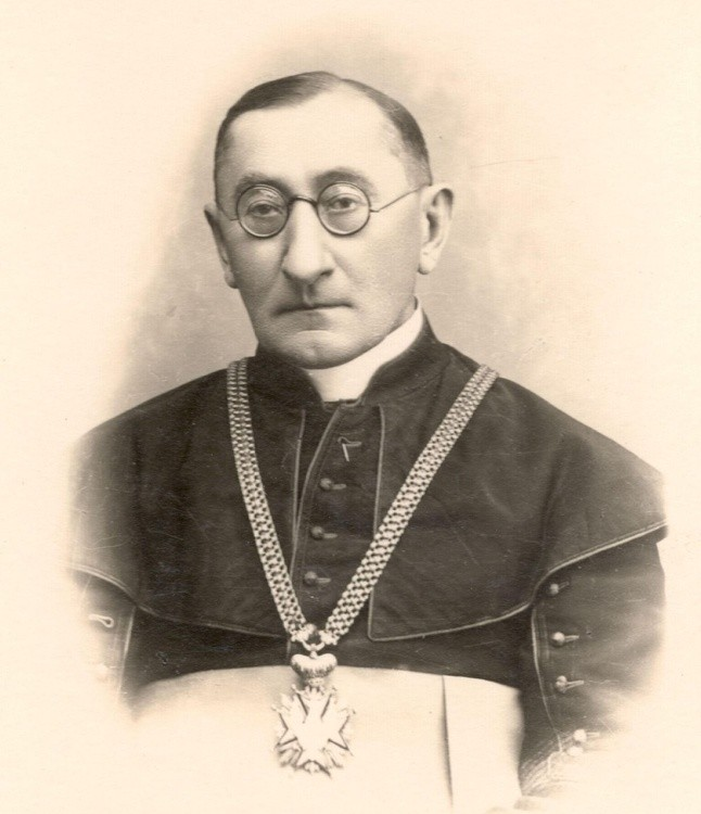 Antoni Rewera (1869-1942) – polski duchowny katolicki, prałat, błogosławiony Kościoła katolickiego, więzień obozu w Dachau, męczennik.